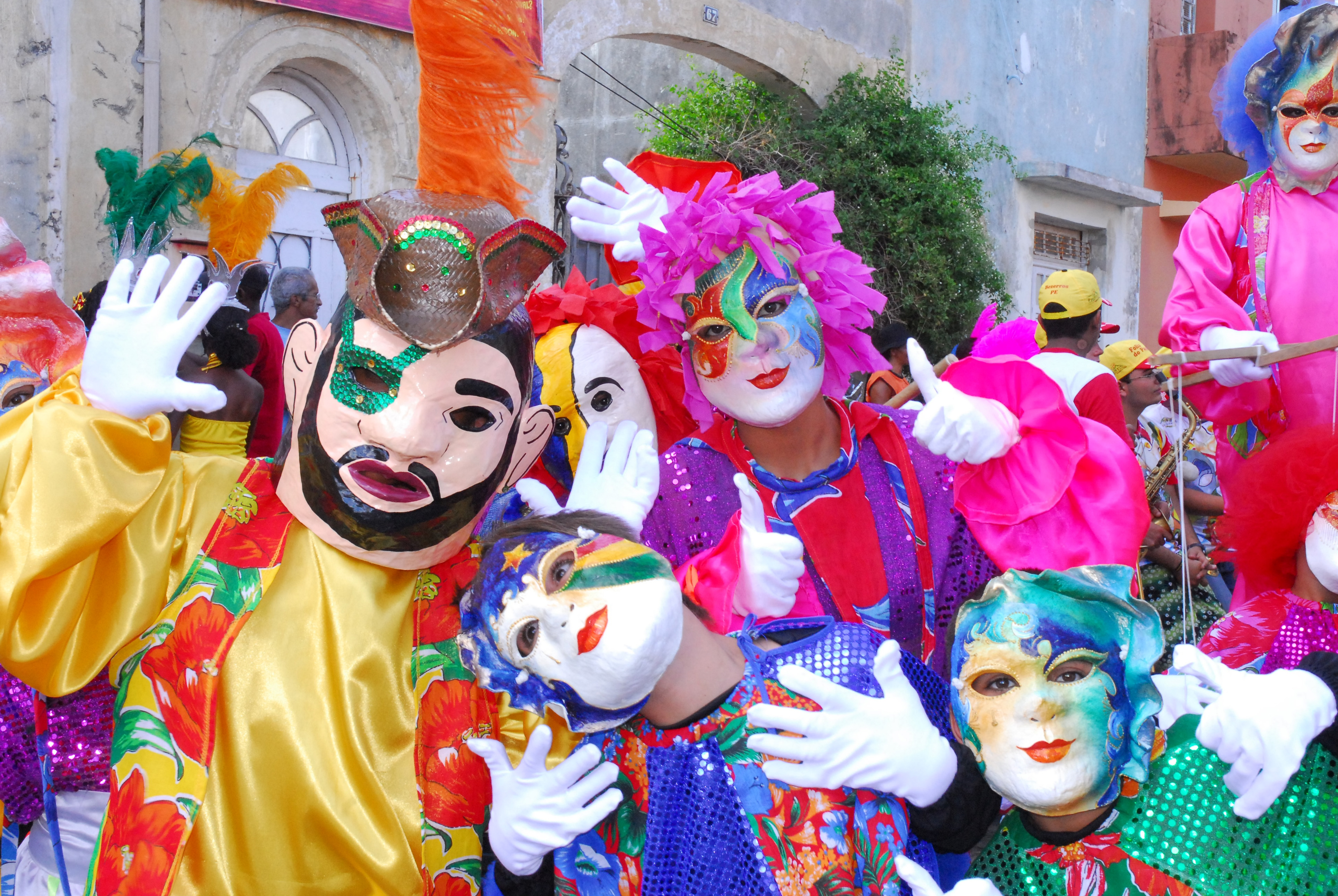 Papangus no Carnaval de Olinda - Olinda, Pernambuco, Brasil